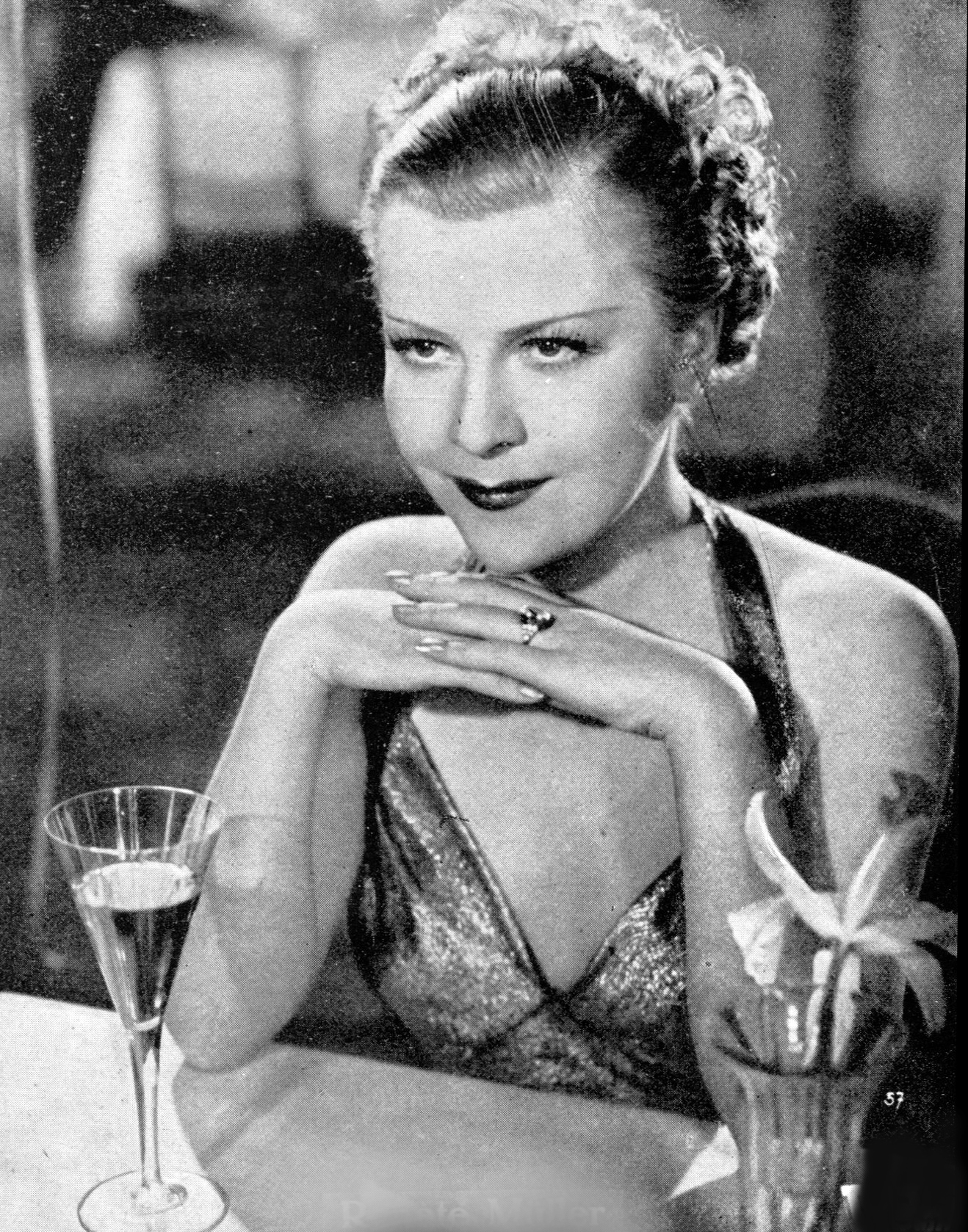 L'attrice tedesca Renate Muller in una immagine pubblicata in Italia - dicembre 1936